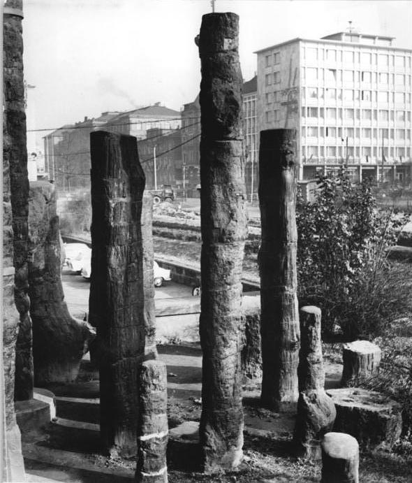 Chemnitz, Versteinerte Bäume Zentralbild Gahlbeck 12.11.1964 Eine Sehenswürdigkeit in Karl-Marx-Stadt (Chemnitz) ist der "Steinerne Wald". Es handelt sich dabei um verkieselte Bäume aus vulkanischer Asche, auch Tuff oder Porphyrtuff genannt, aus der Zeit des Perm im Rotliegenden. Diese steinernen Bäume sind etwa 291 Millionen Jahre alt und waren im Zentrum von Karl-Marx-Stadt aufgestellt. Seit 2004 sind diese im Museum für Naturkunde Chemnitz im DAStietz ausgestellt.